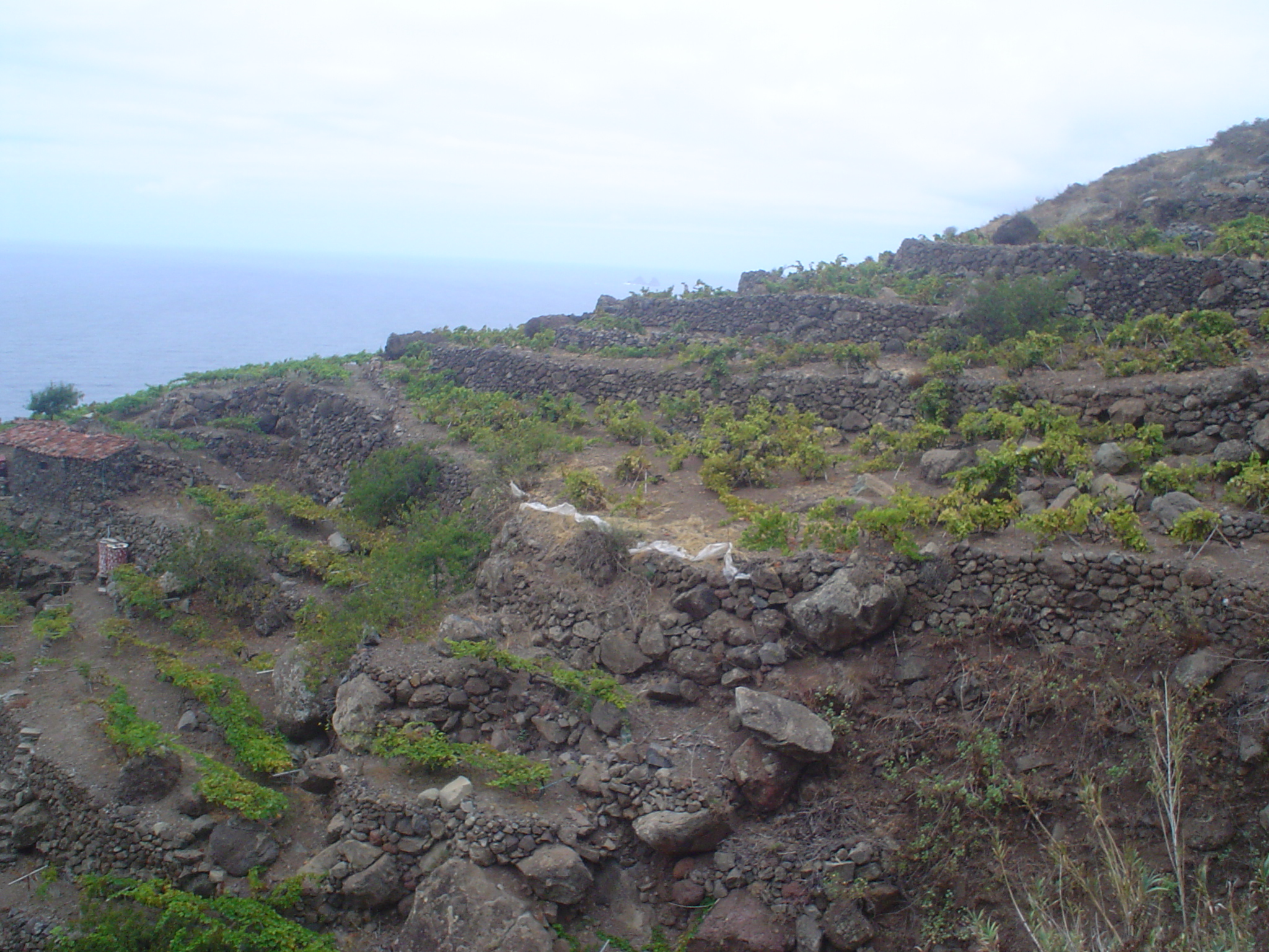 Viñas en Taganana, Tenerife.